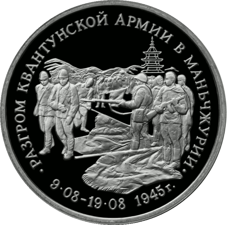 Монета Банка России — Серия: «Великая Отечественная война», 50-летие Победы в Великой Отечественной войне , Разгром советскими войсками Квантунской армии в Маньчжурии, 3 рубля, реверс.